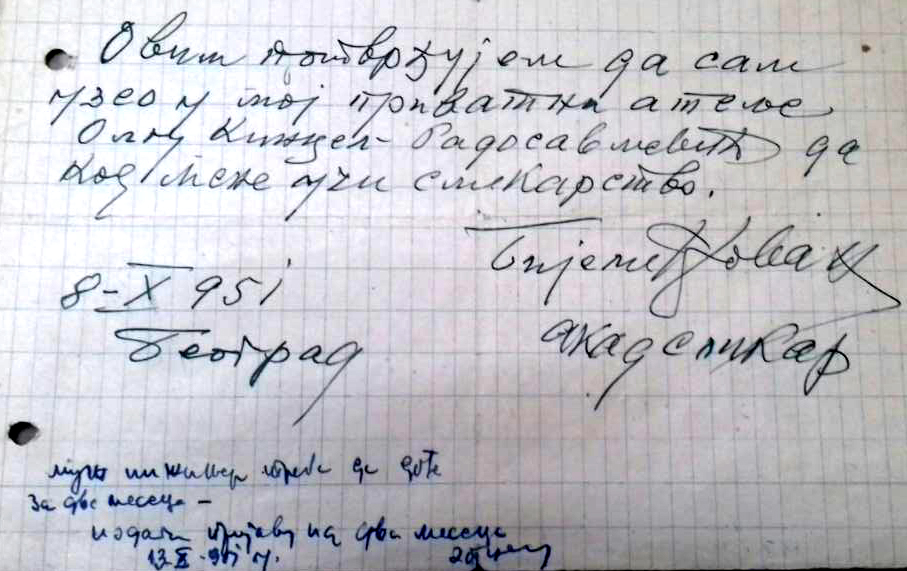 Potvrda Olge Radosavljević da je radila kod Bjelića